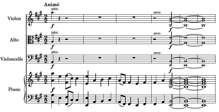 Exemple 1 créé avec Lilypond